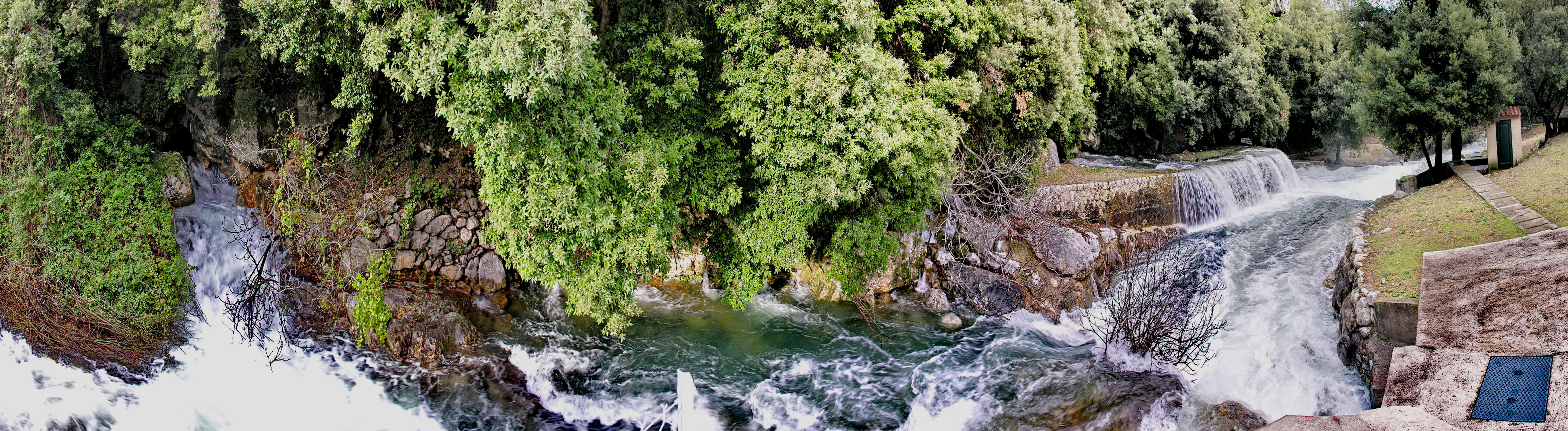 panorama des sources du Naissoun à Mons 83